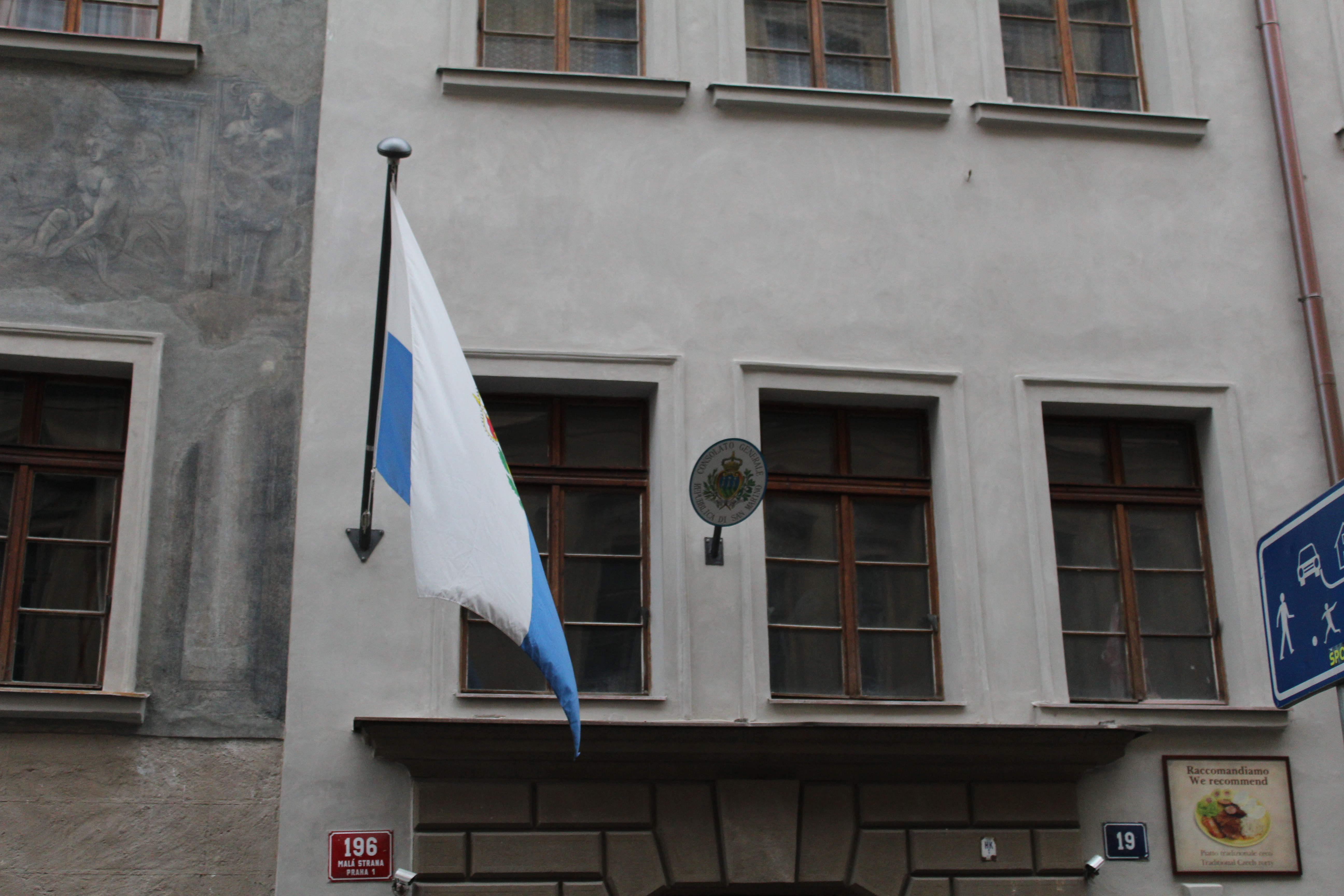 Consulat de Saint-Marin à Prague.